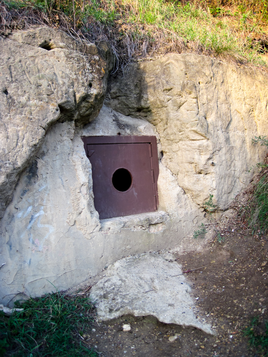 Prochazka v PP Prosecke skaly. Fotografie jsou urceny k ilustraci clanku o teto Prirodni pamatce.